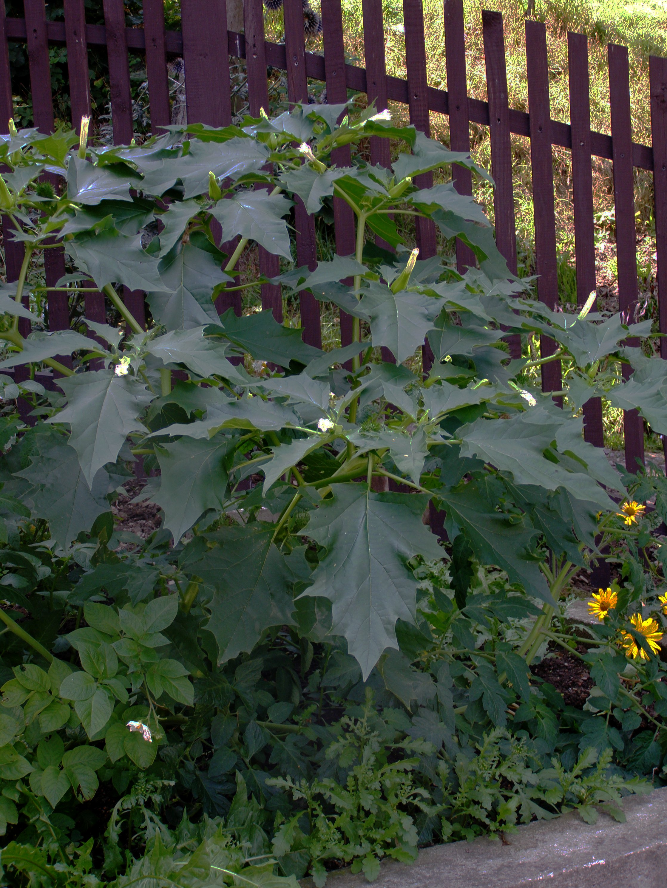 Durman obecný